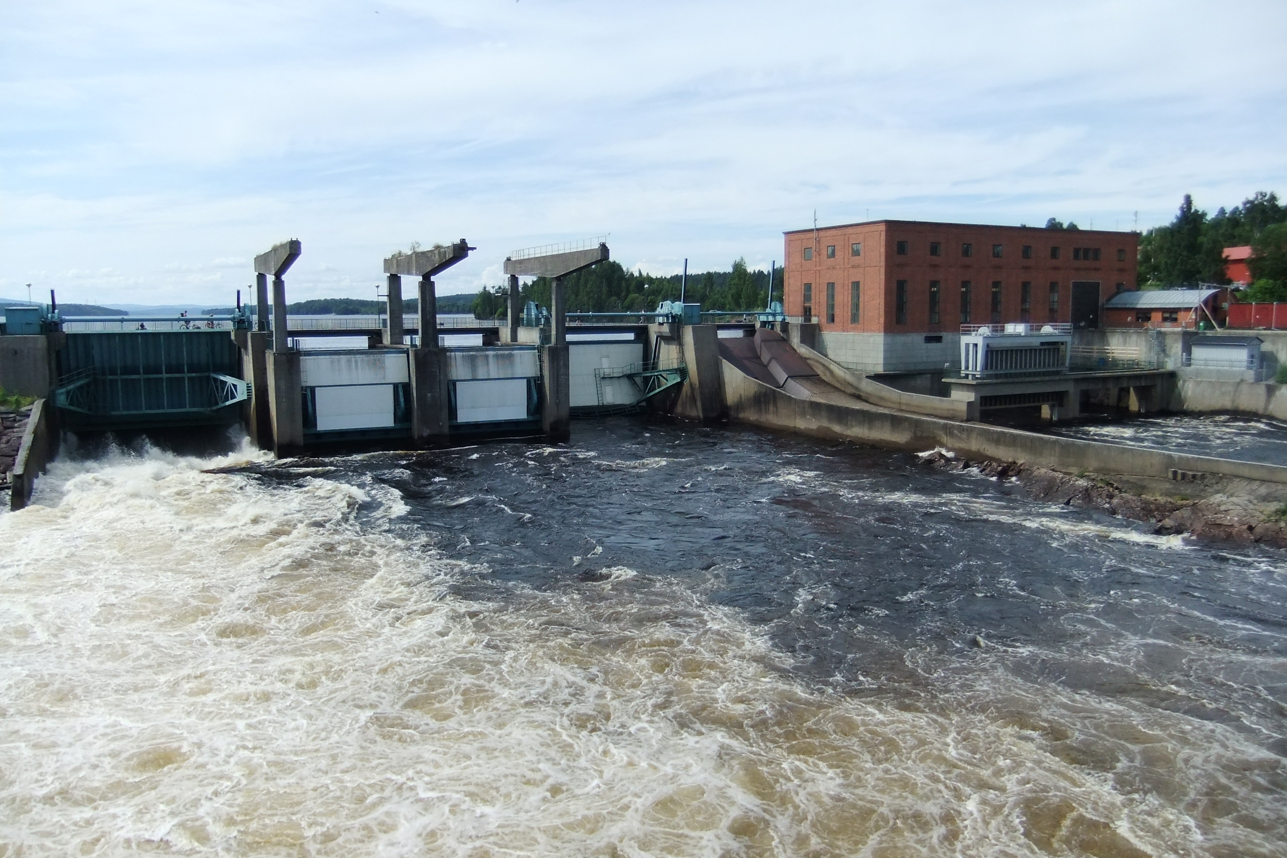 Kraftstationen i Bergvik i Hälsingland sedd från bilbron över Ljusnan.